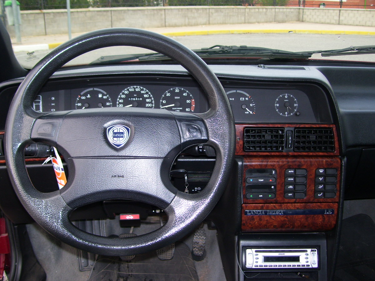 Cuadro Lancia Dedra